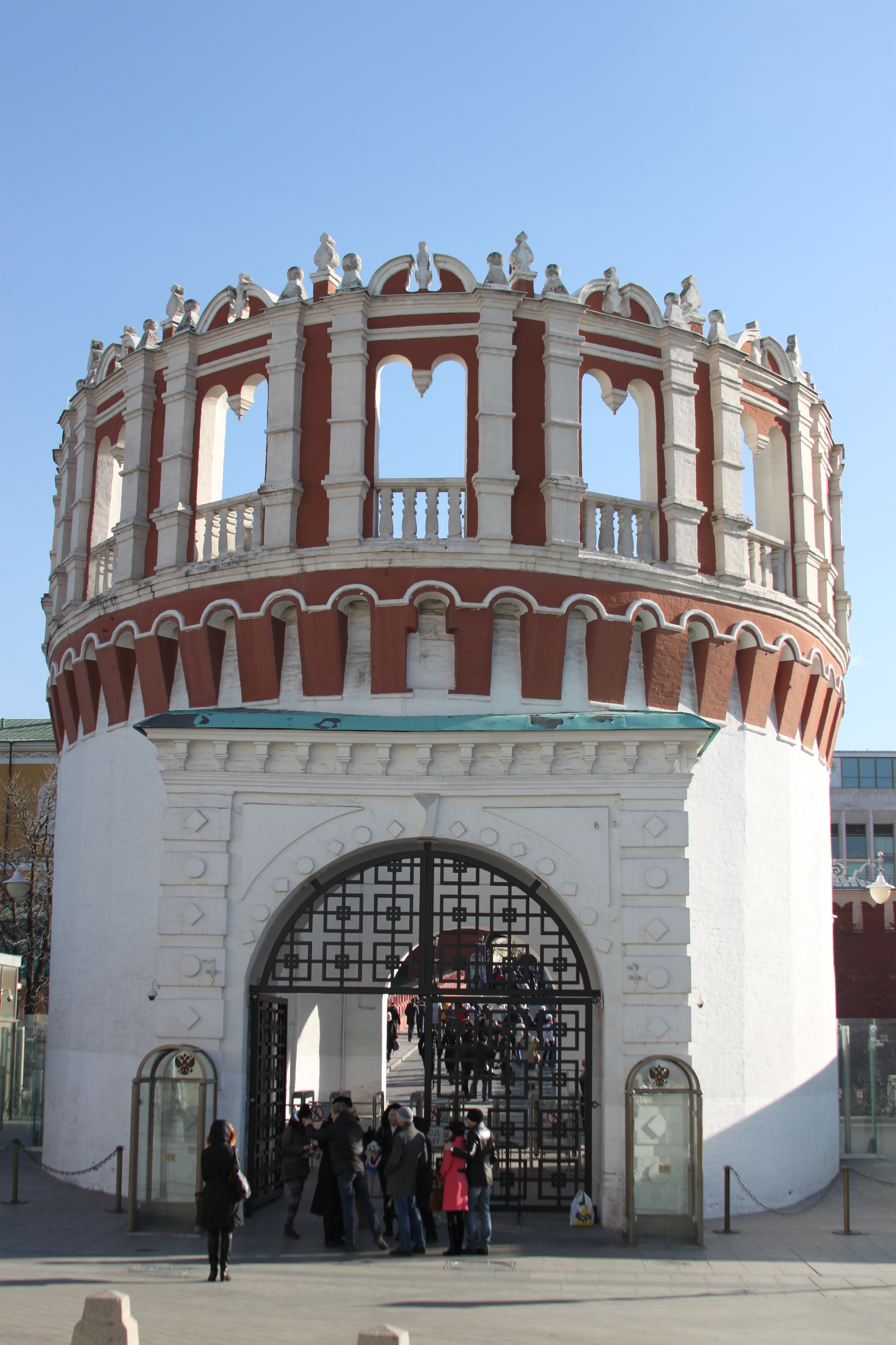 2014 Moscow Kutafia Tower Москва Кремль. Башня Кутафья